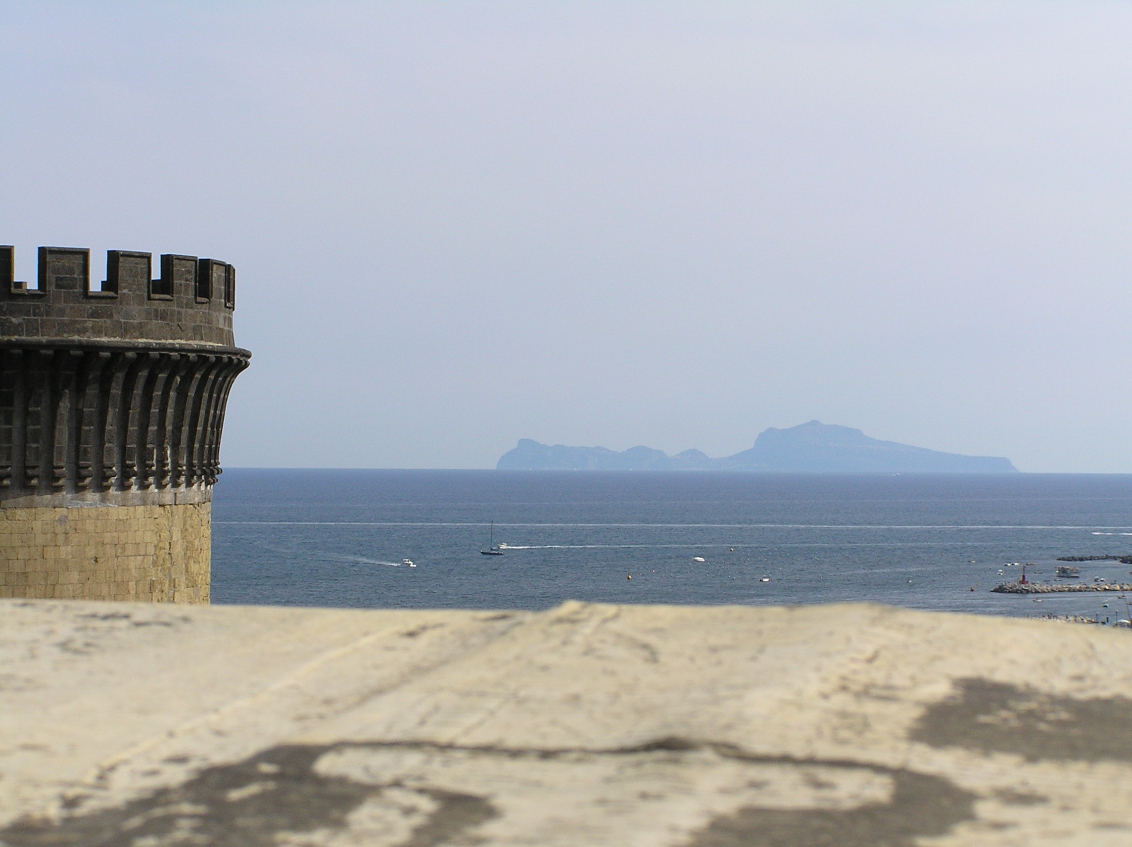 Billede af øen Capri set fra Napoli